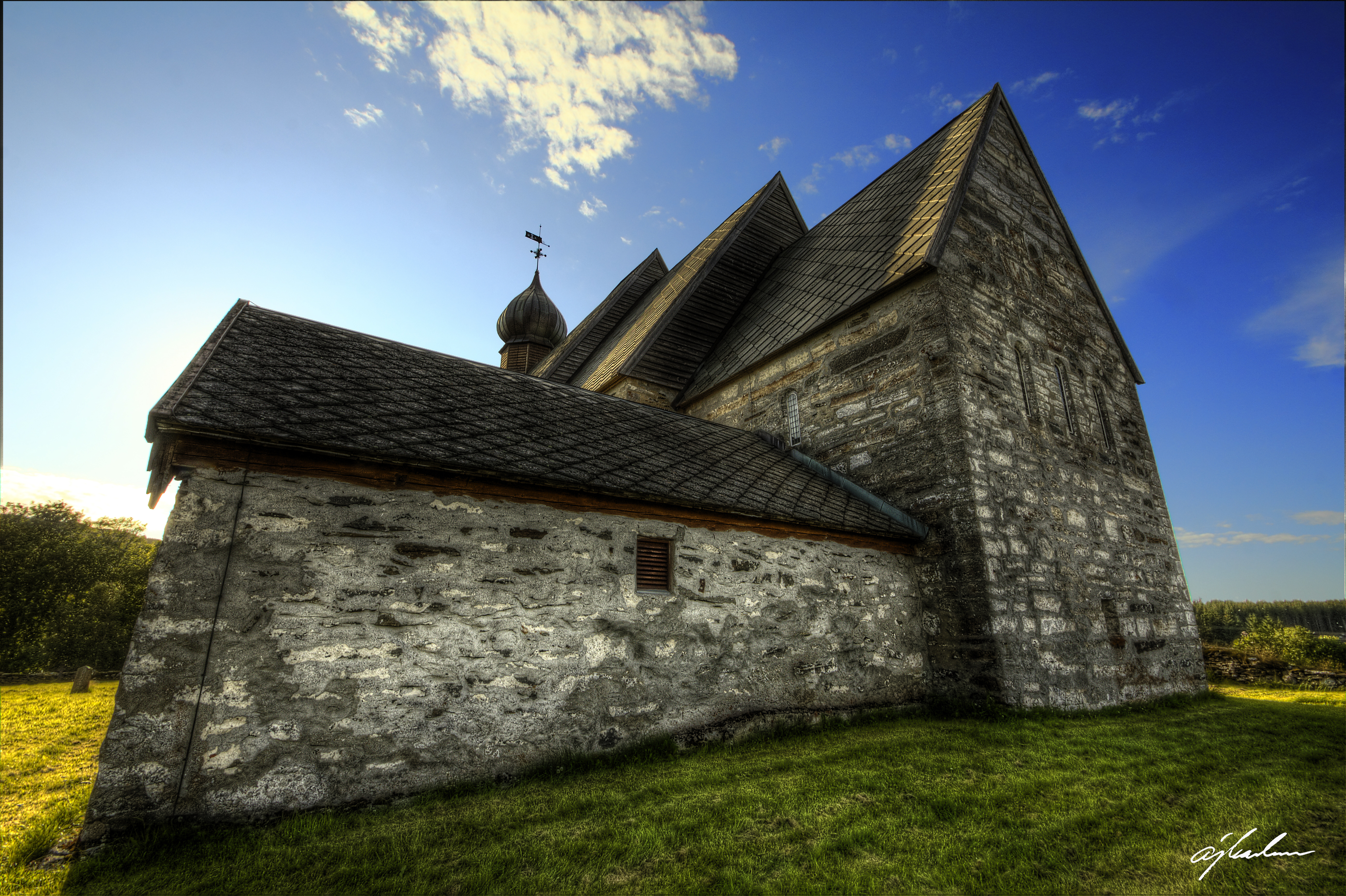 Dønnes Kirke